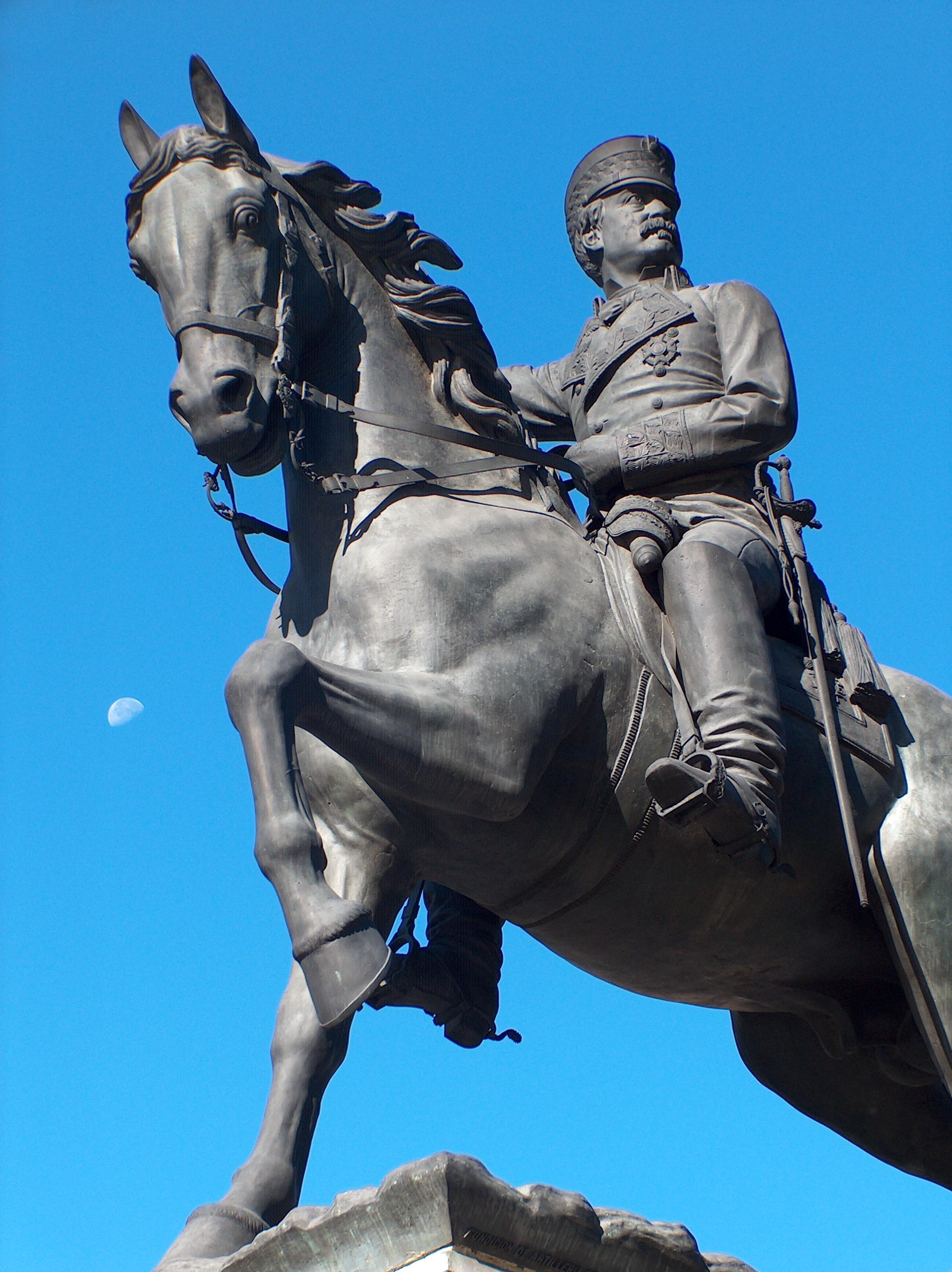 Monumento ecuestre a Manuel Gutiérrez de la Concha, Marqués del Duero, por Andrés Aleu (1885) - Plaza Gregorio Marañon (Madrid).